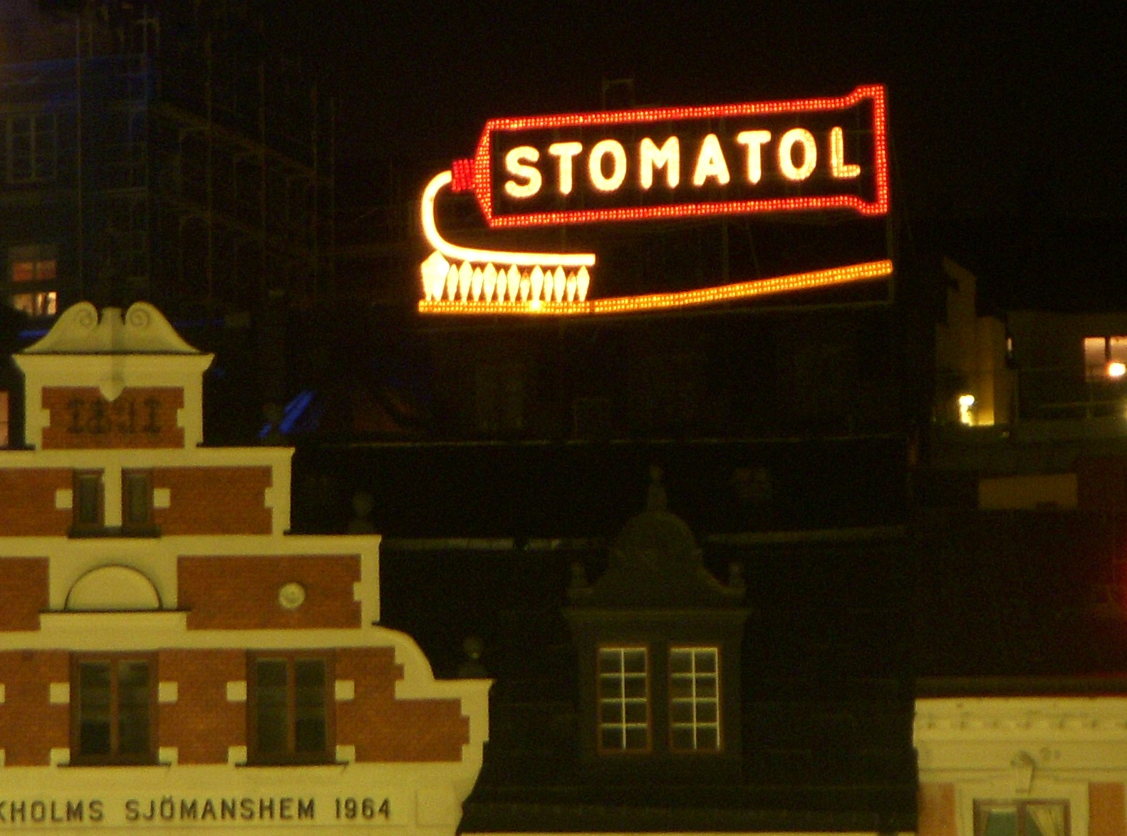 Stomatolskylten vid Slussen i Stockholm fyller 100 år